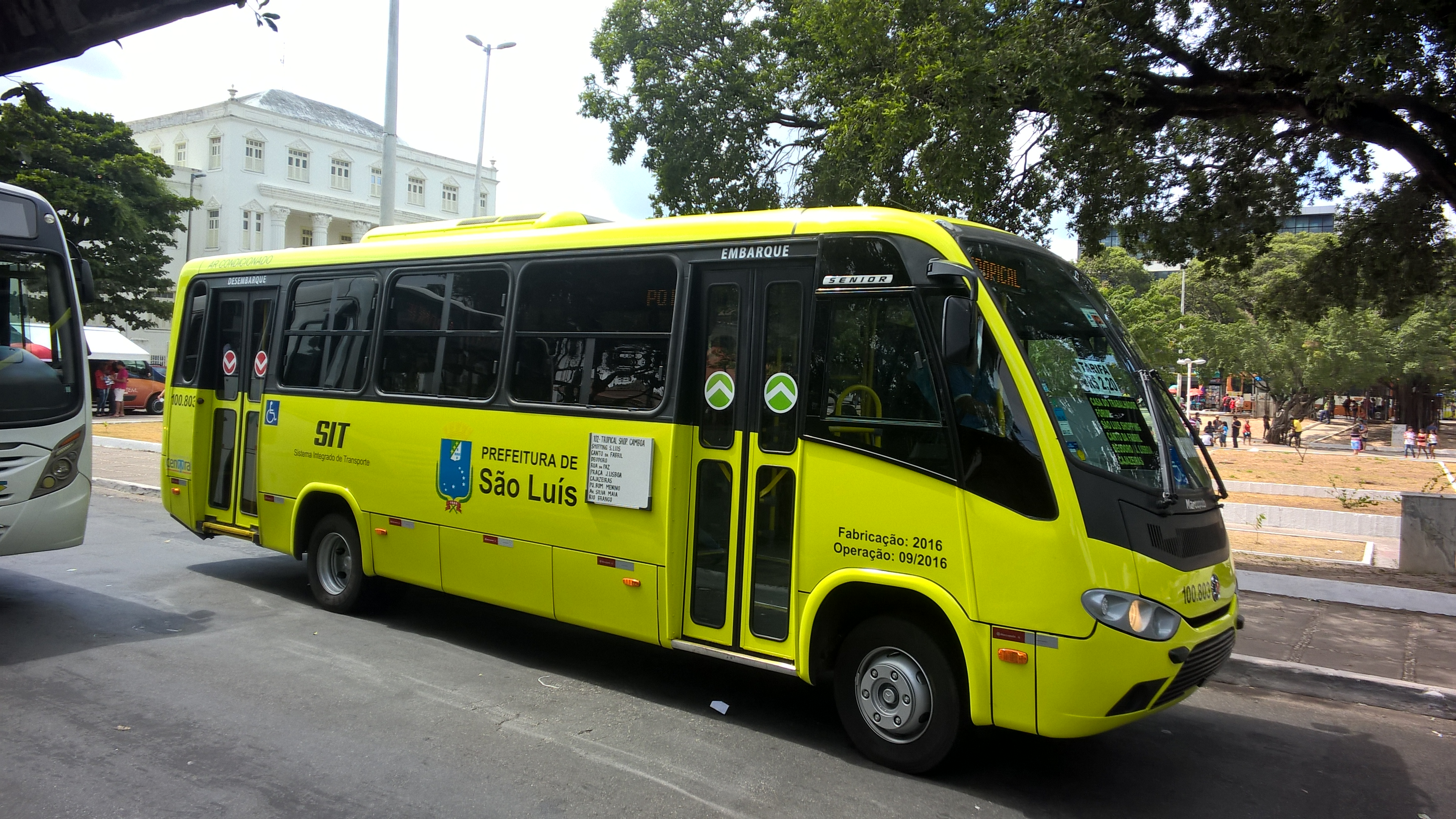 Carro nº 100-803 da Ratrans, empresa que atua no Sistema Integrado de Transporte de São Luís, MA - Brasil